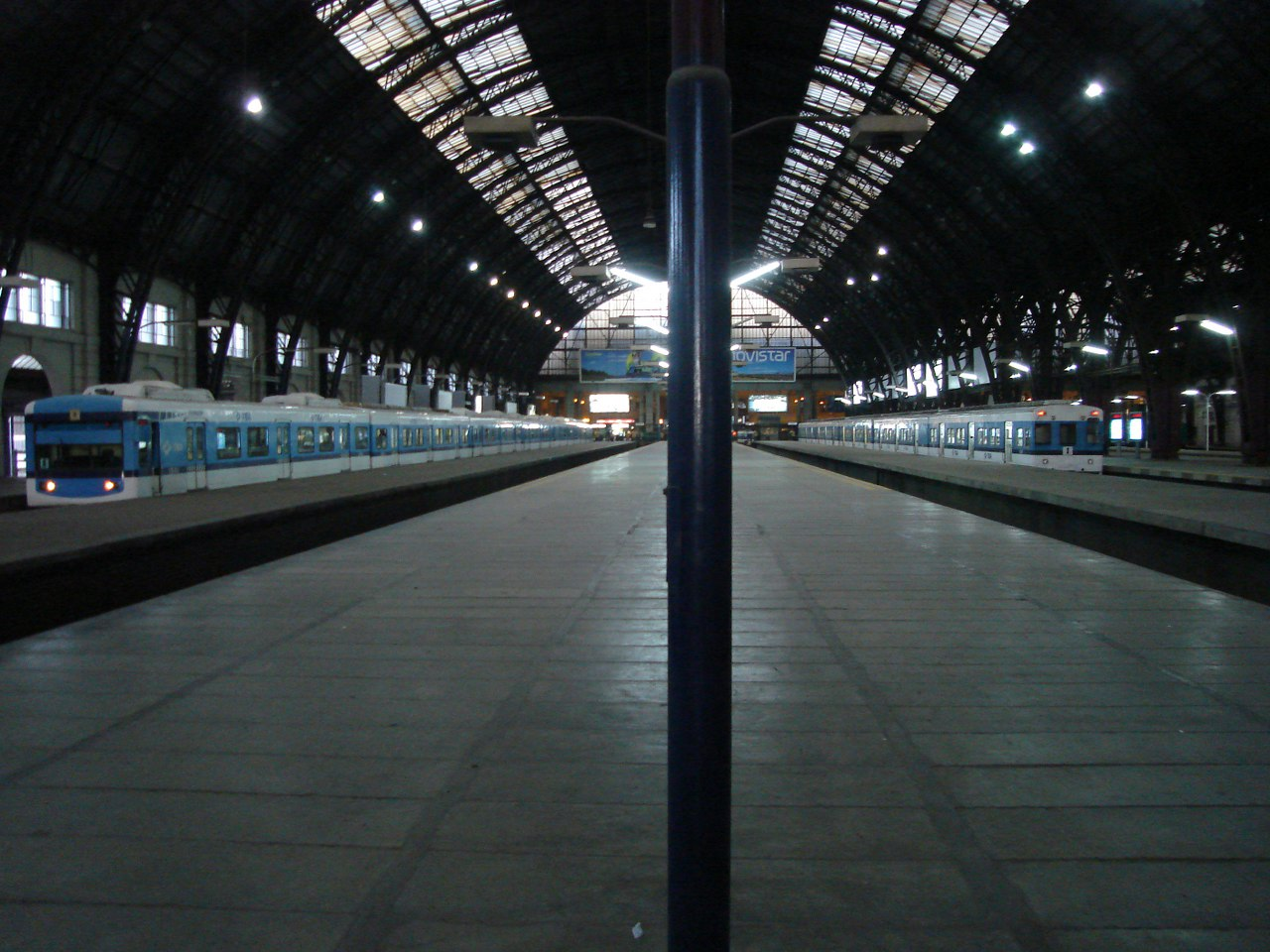 Dos formaciones, una a Tigre y otra a José León Suárez, vistas desde la plataforma 3 dela estación Retiro Mitre.